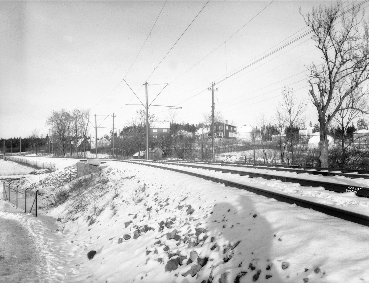 Vestgrensa stasjon var fram til 22. august 1999 en av Sognsvannsbanens stasjoner. Stasjonen ble nedlagt til fordel for Forskningsparken i forbindelse med åpningen av trikkelinjen til Rikshospitalet.